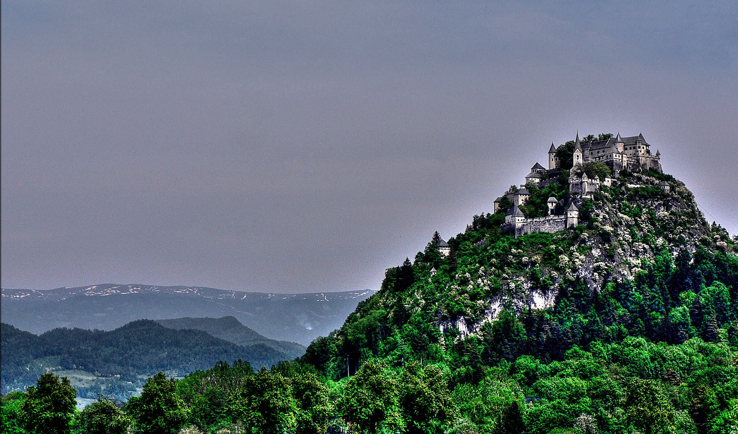 Die Festung befindet sich in Kärnten, Österreich, östlich von Skt. Veit. Begonnen wurde die Anlage vermutlich um 860 n Chr. und war bis Mitte des 12 Jhd im Besitz des Erzbistums Salzburg. 1571 wurde sie von Georg von Khevenhüller gekauft und ist auch heute noch im Besitz der Familie. Heribert Pohl